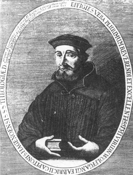 Wolfgang Capito (1487-1541)